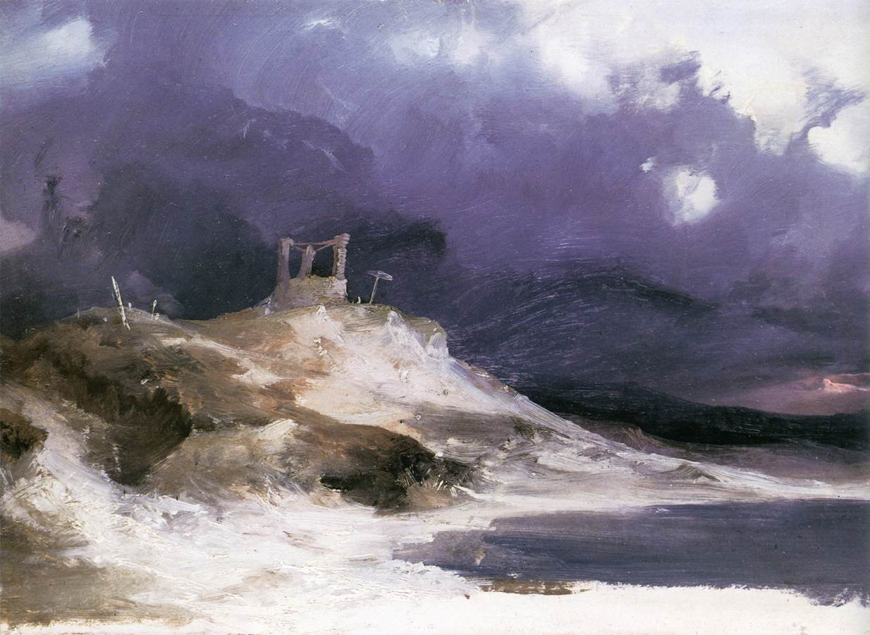 upside down, see also Staatliche Kunstsammlungen Dresden